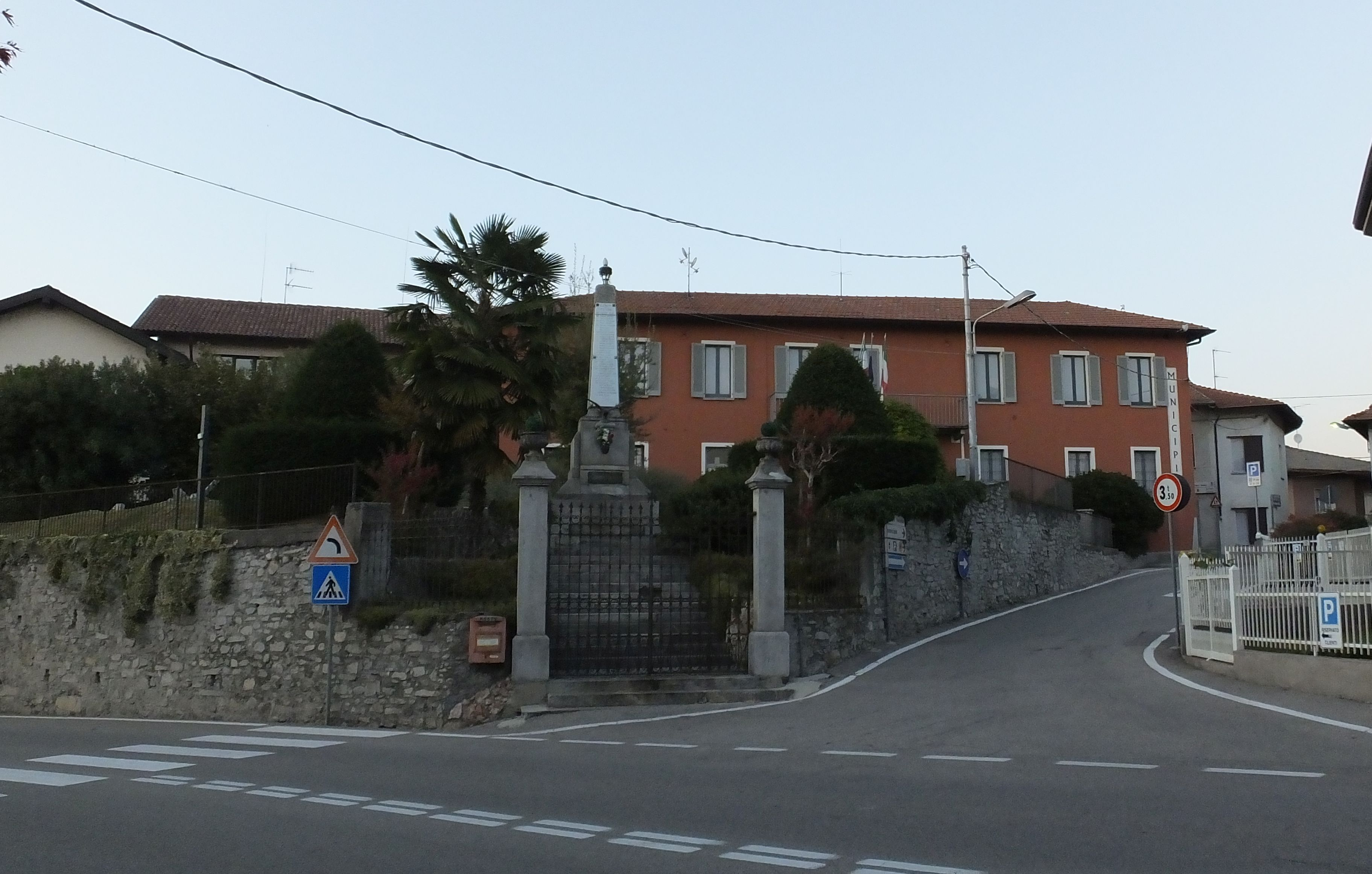 Cadrezzate, Róg Via Mario Vallerini i Via Vittorio Veneto. Ratusz z obeliskiem